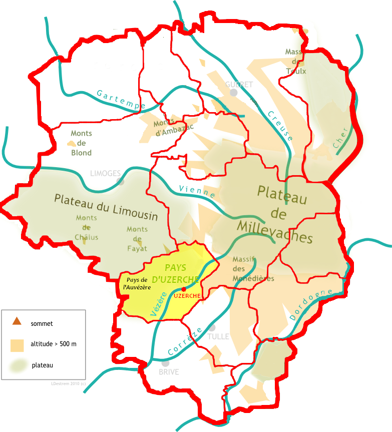 Localisation du Pays d'Uzerche sur la carte des pays traditionnels du Limousin